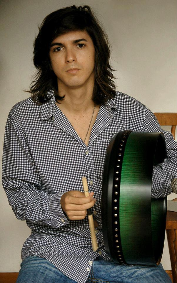 musico tocando bodhran